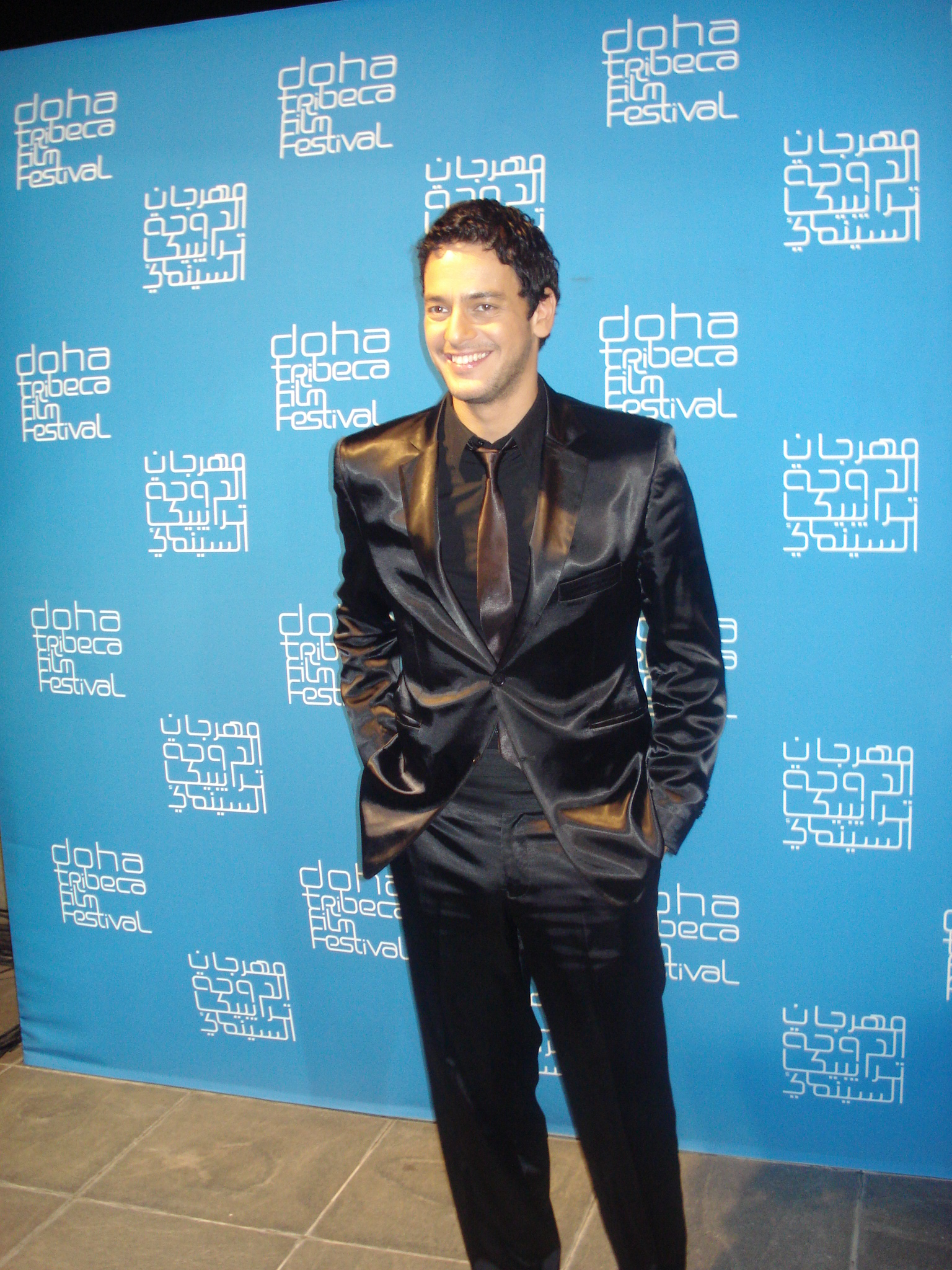 Khaled Abol Naga in Qatar 2009.